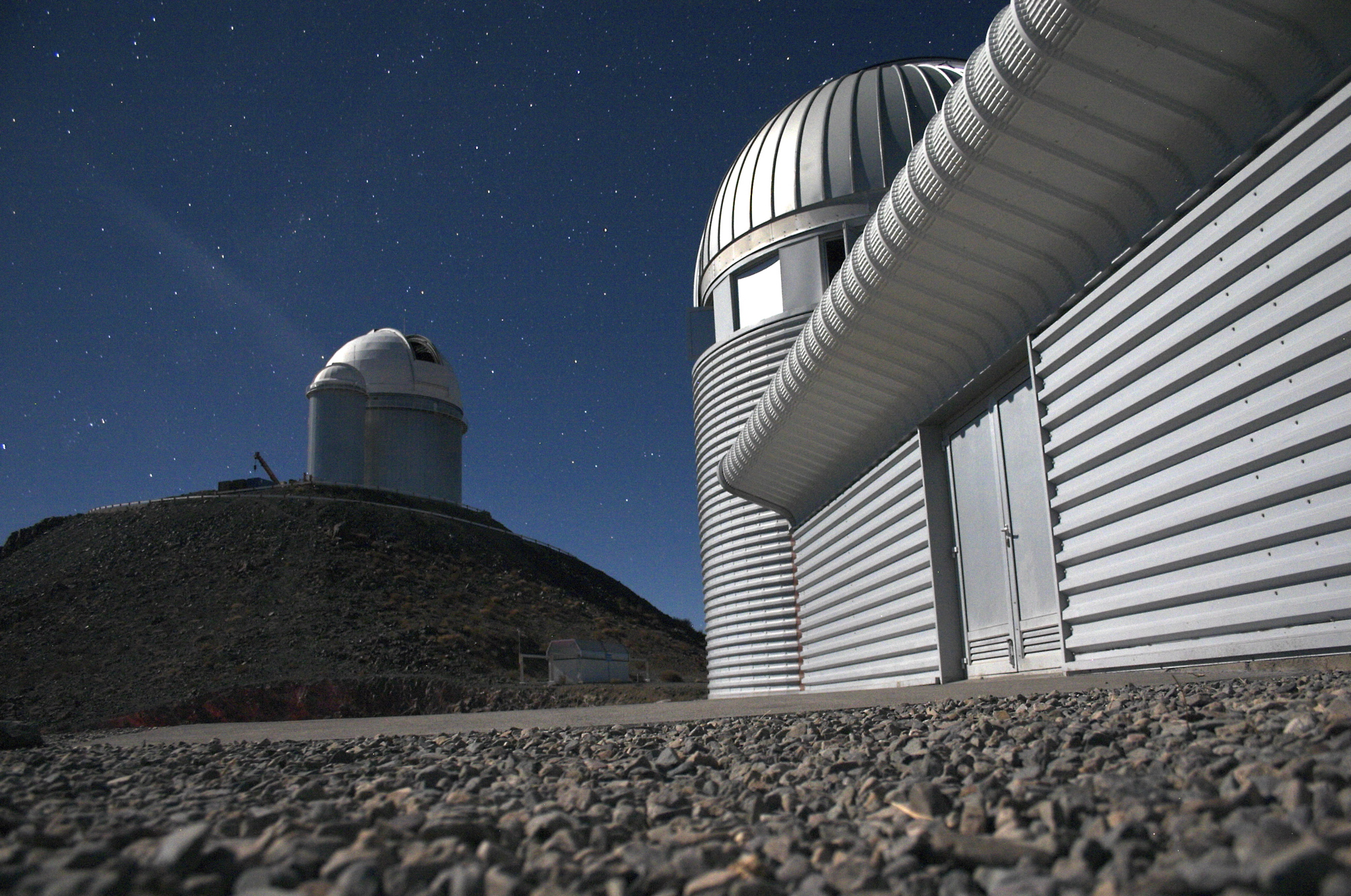 Vue nocture du télescope de 3.6 mètres et du télescope suisse à l'Observatoire de La Silla, au Chili.